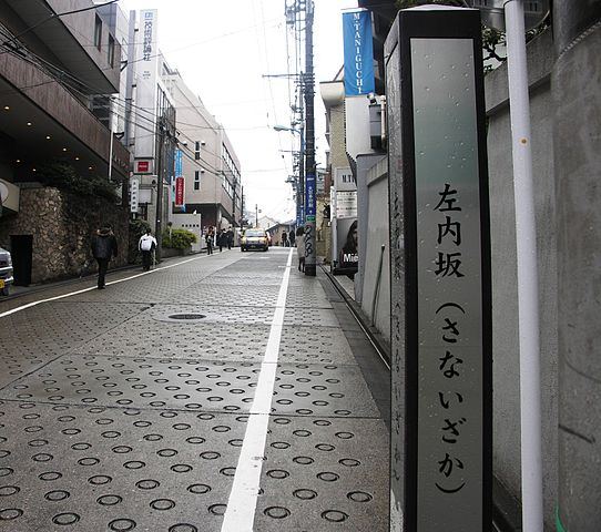 左内坂（東京都新宿区市谷左内町）